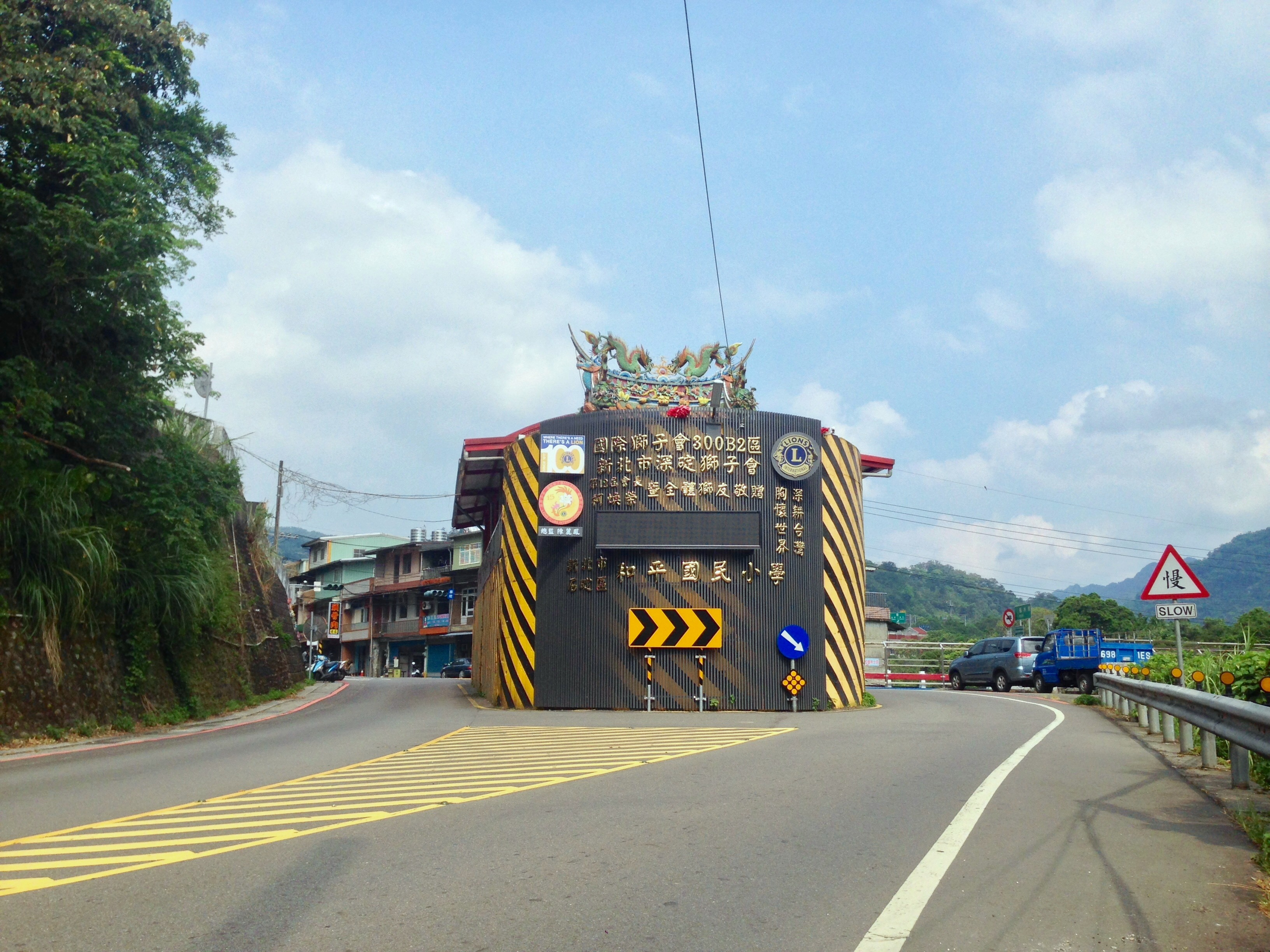 八分寮福德宮背面